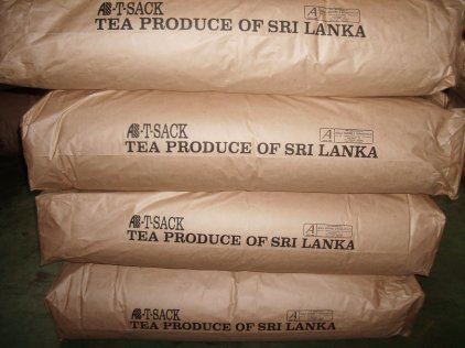 Sacs de te de Sri Lanka, foto feta per J. Ollé el juliol del 2006